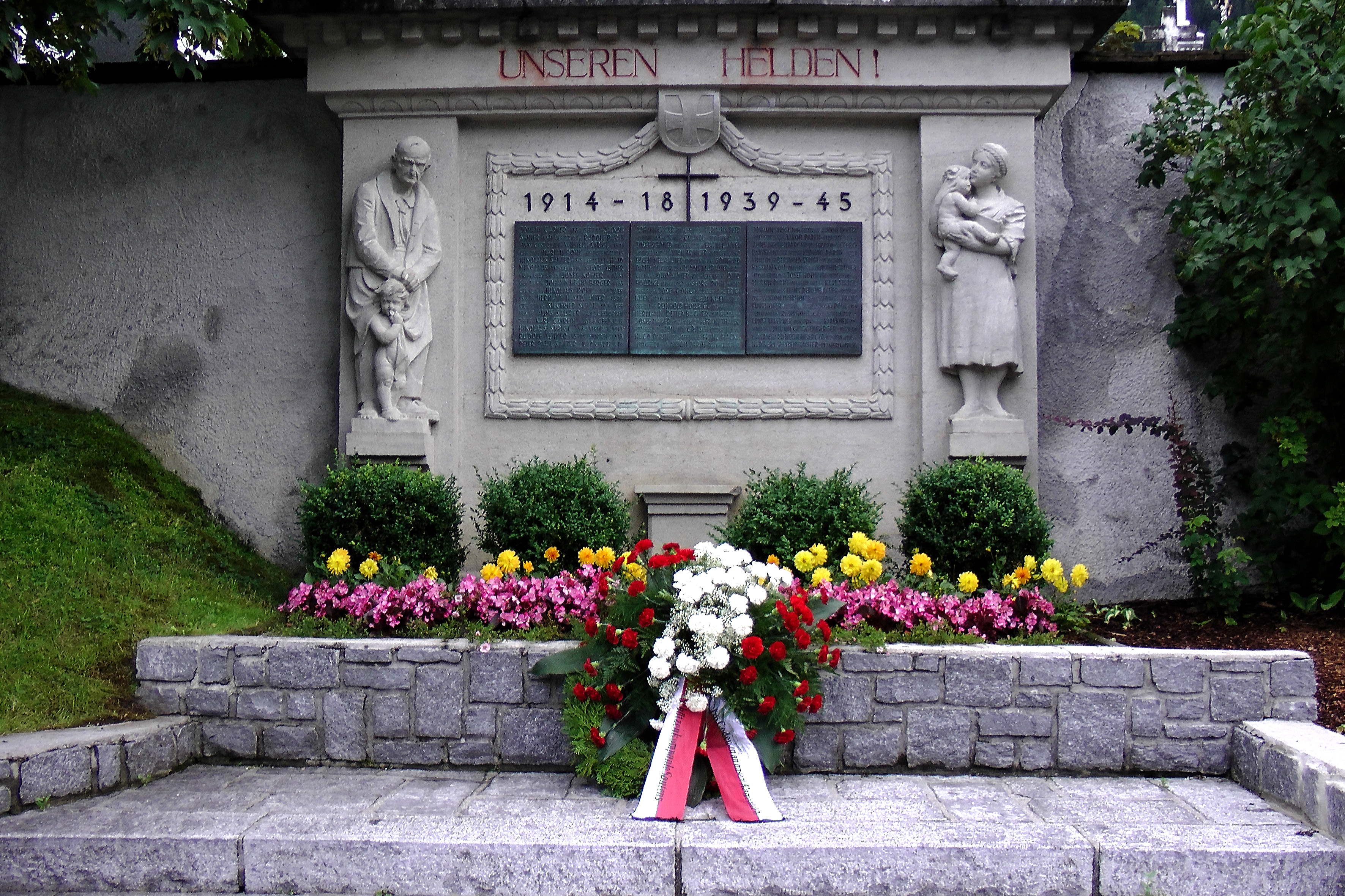 Kriegerdenkmal